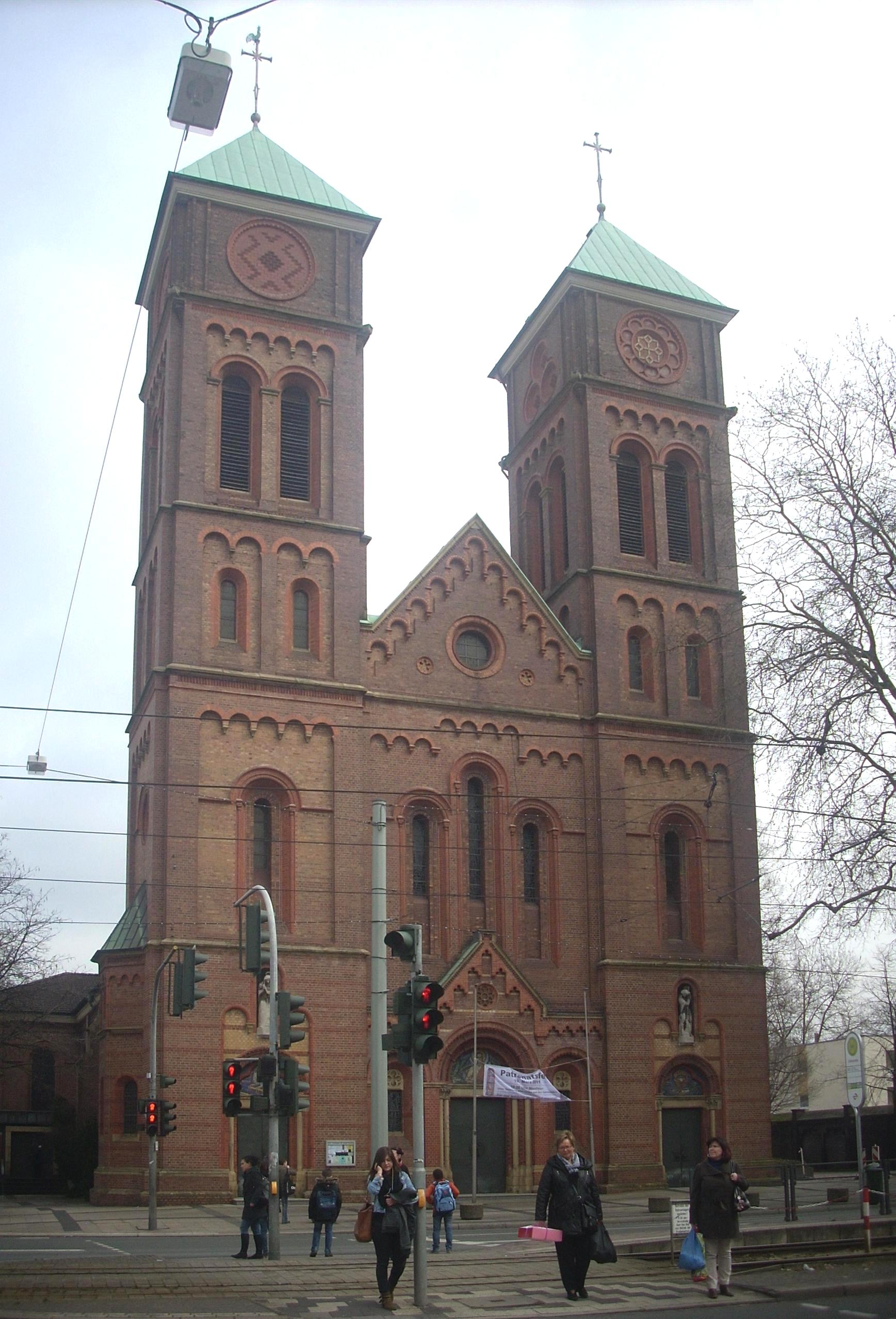 Gelsenkirchen-Schalke, kath. Kirche St. Joseph